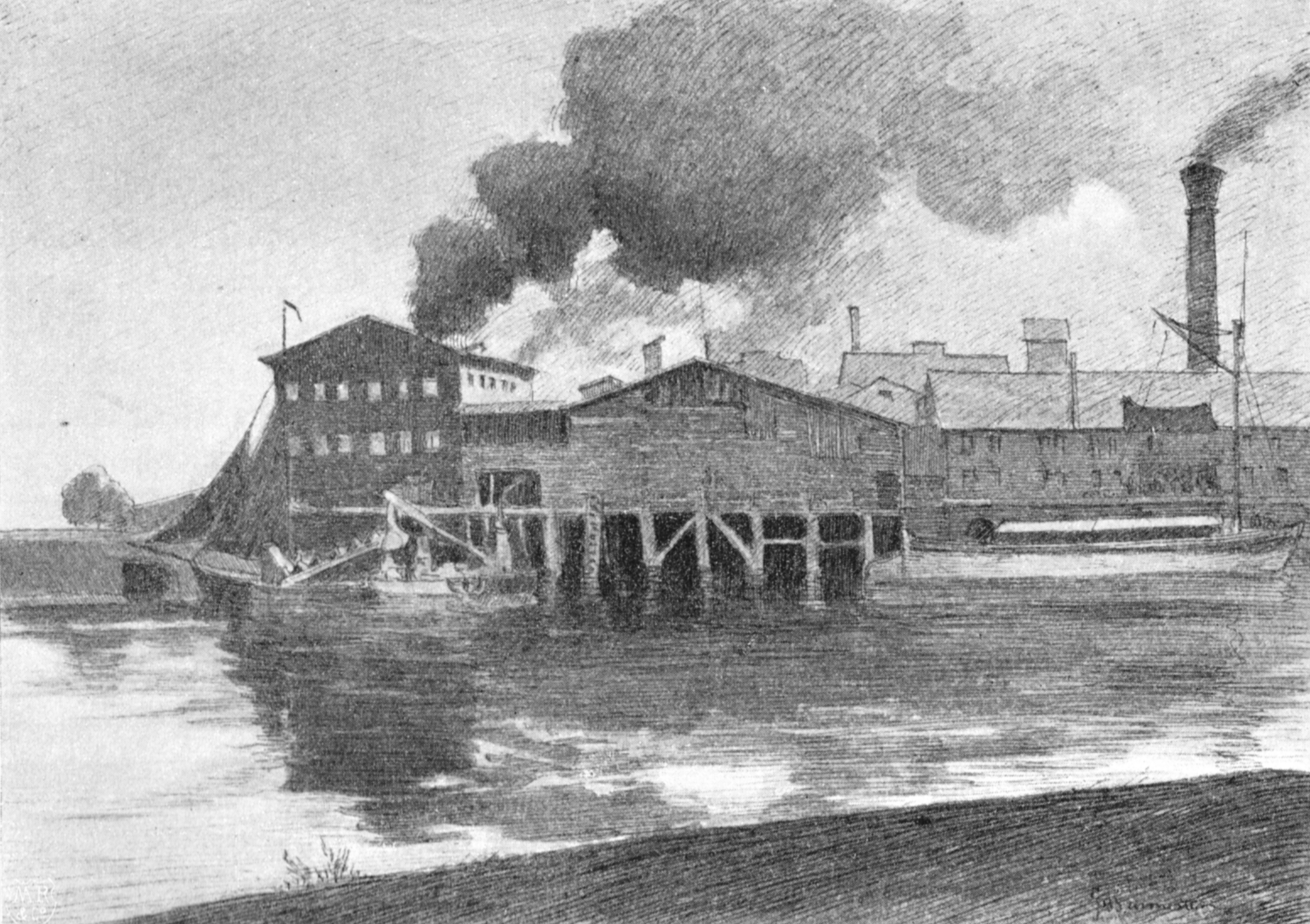 Die Portland-Zement-Fabriek Alsen in Itzehoe, Zeichnung von Georg Burmester um 1895